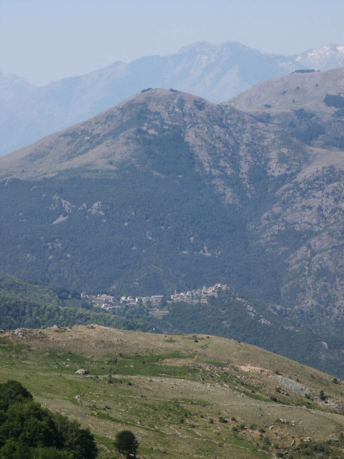 carticasi, corsica